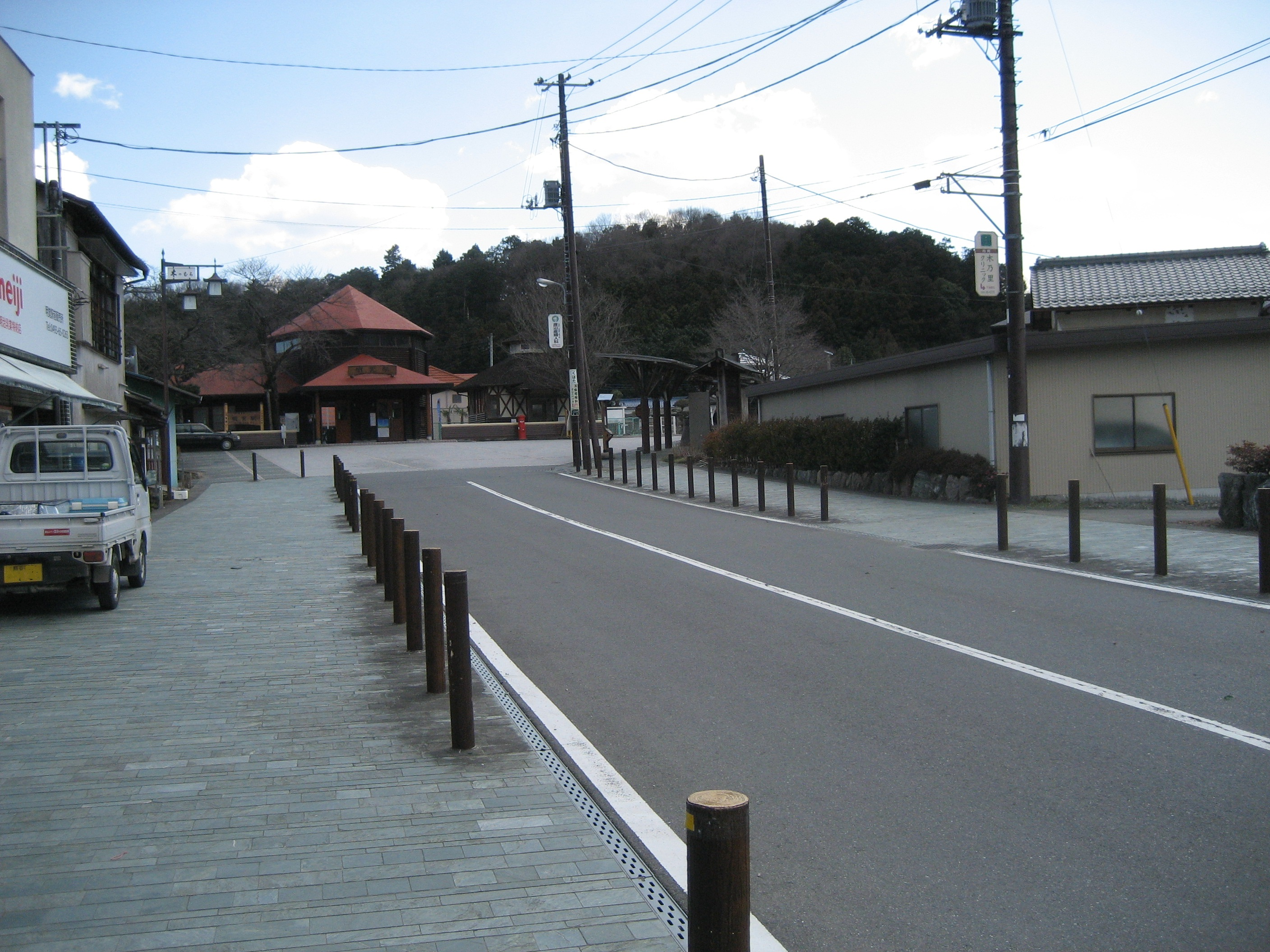 埼玉県道188号線明覚駅付近